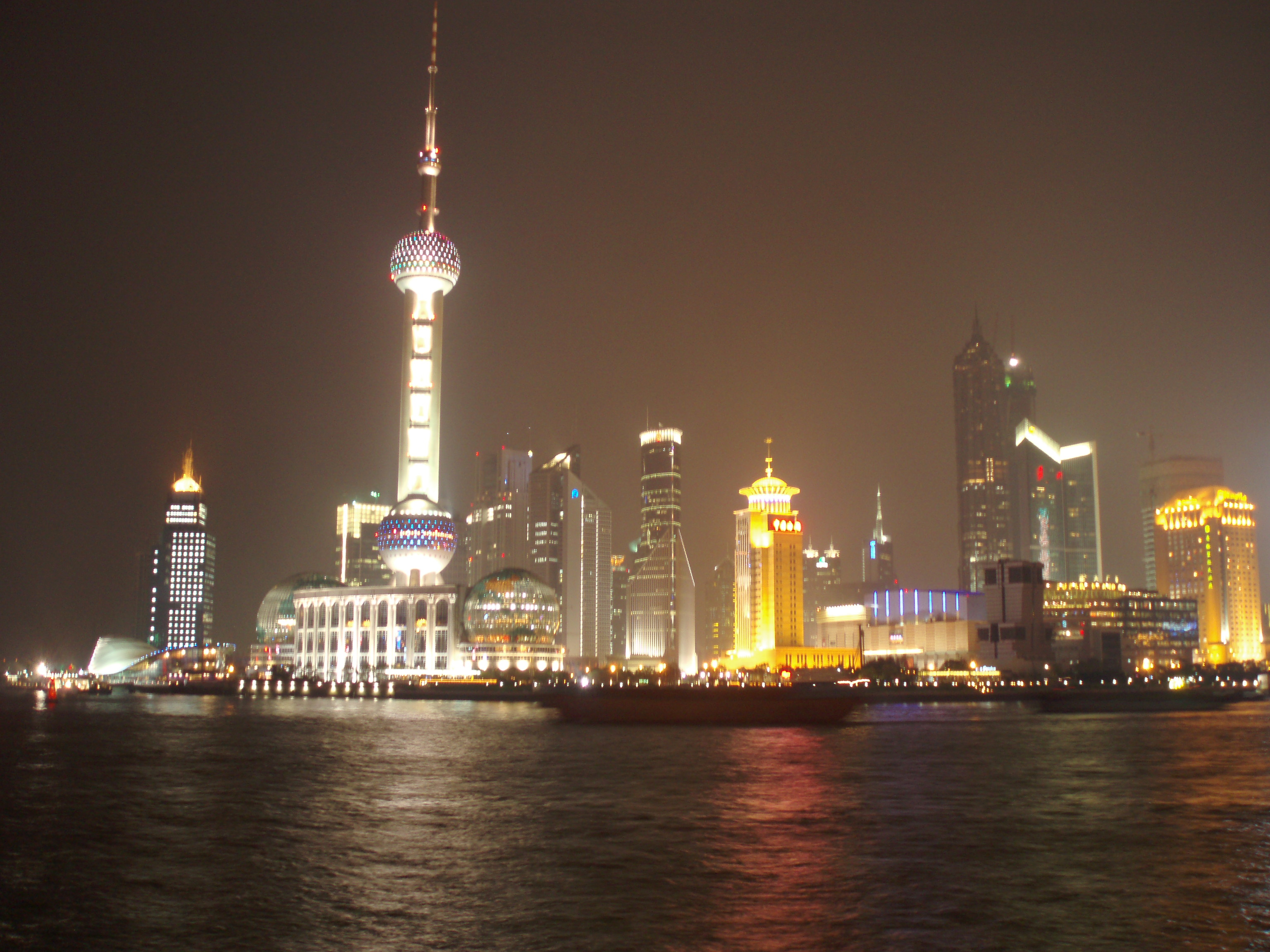 Shanghai Pudong la nuit